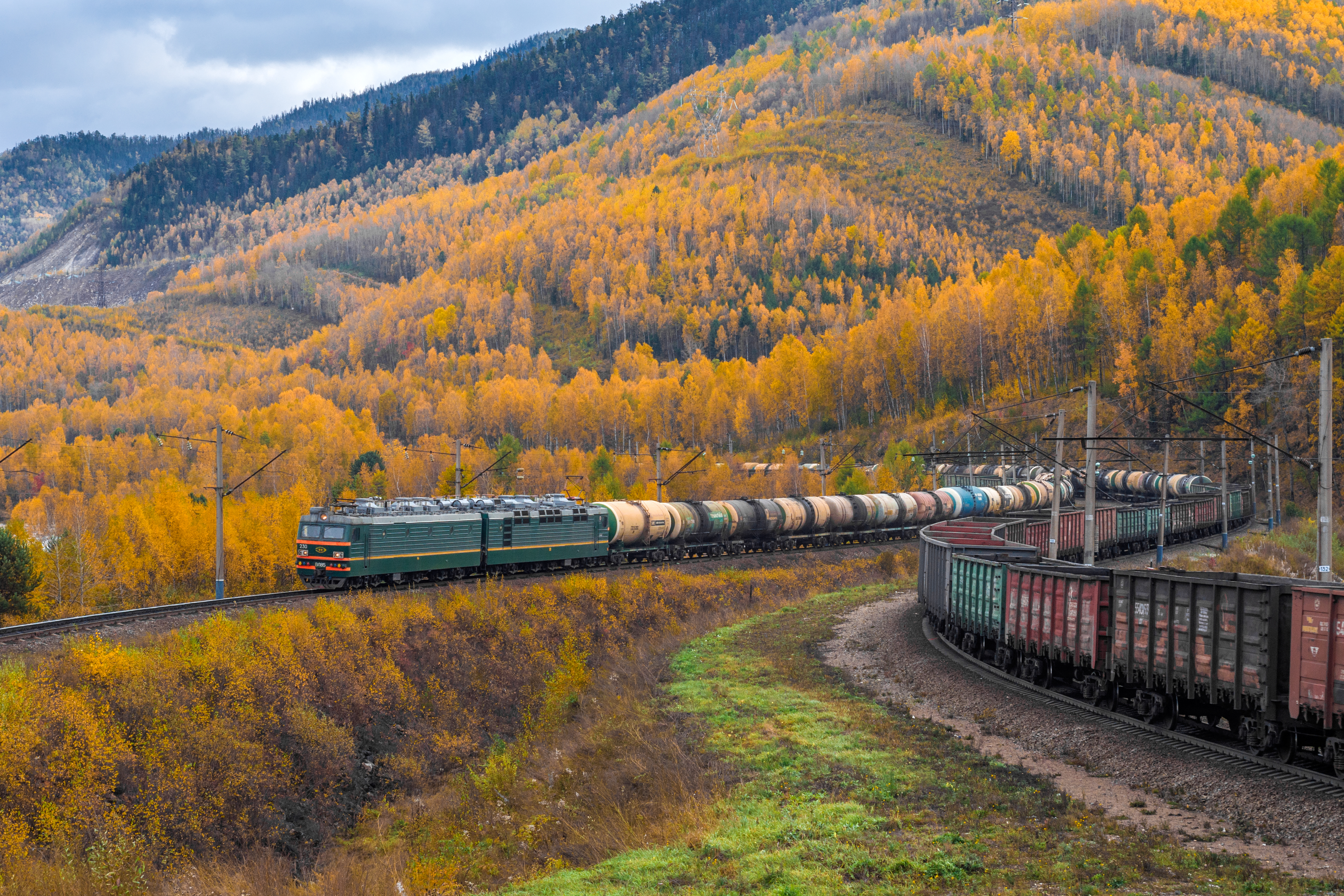 Слюдянка: Слюдянский район, Иркутская область This image is related to the protected area of Russia number 3810359